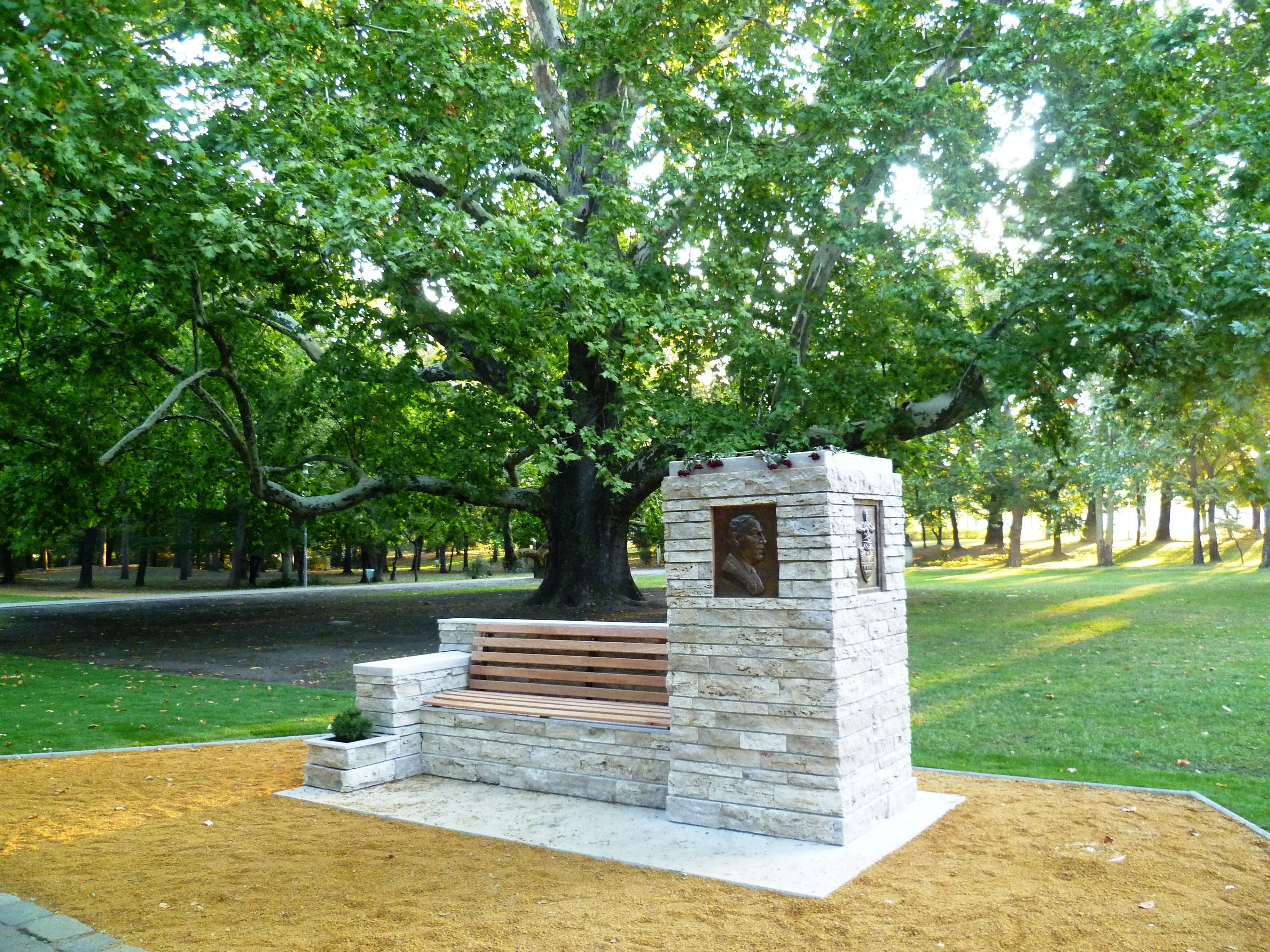 Emlékpad újjáalkotott változatát - Módy Péter szobrászművész és Dani Gyula szobrász művét - 2013. október 1-jén, Urmánczy Nándor születésének 145. évfordulója alkalmából újból felállították a Margitszigeten. Tájképi kert